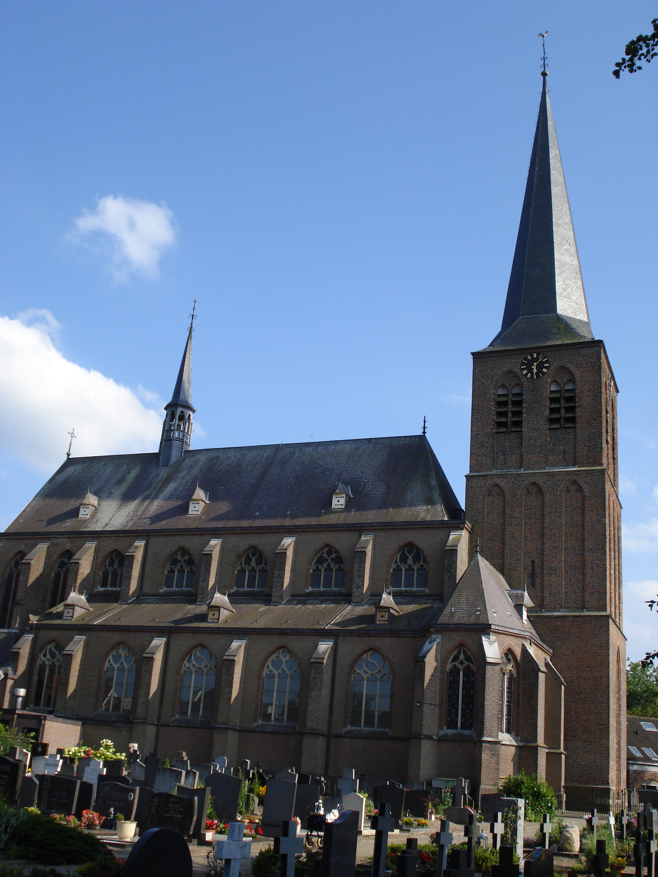 Herpen, l'église Saint-Sébastien